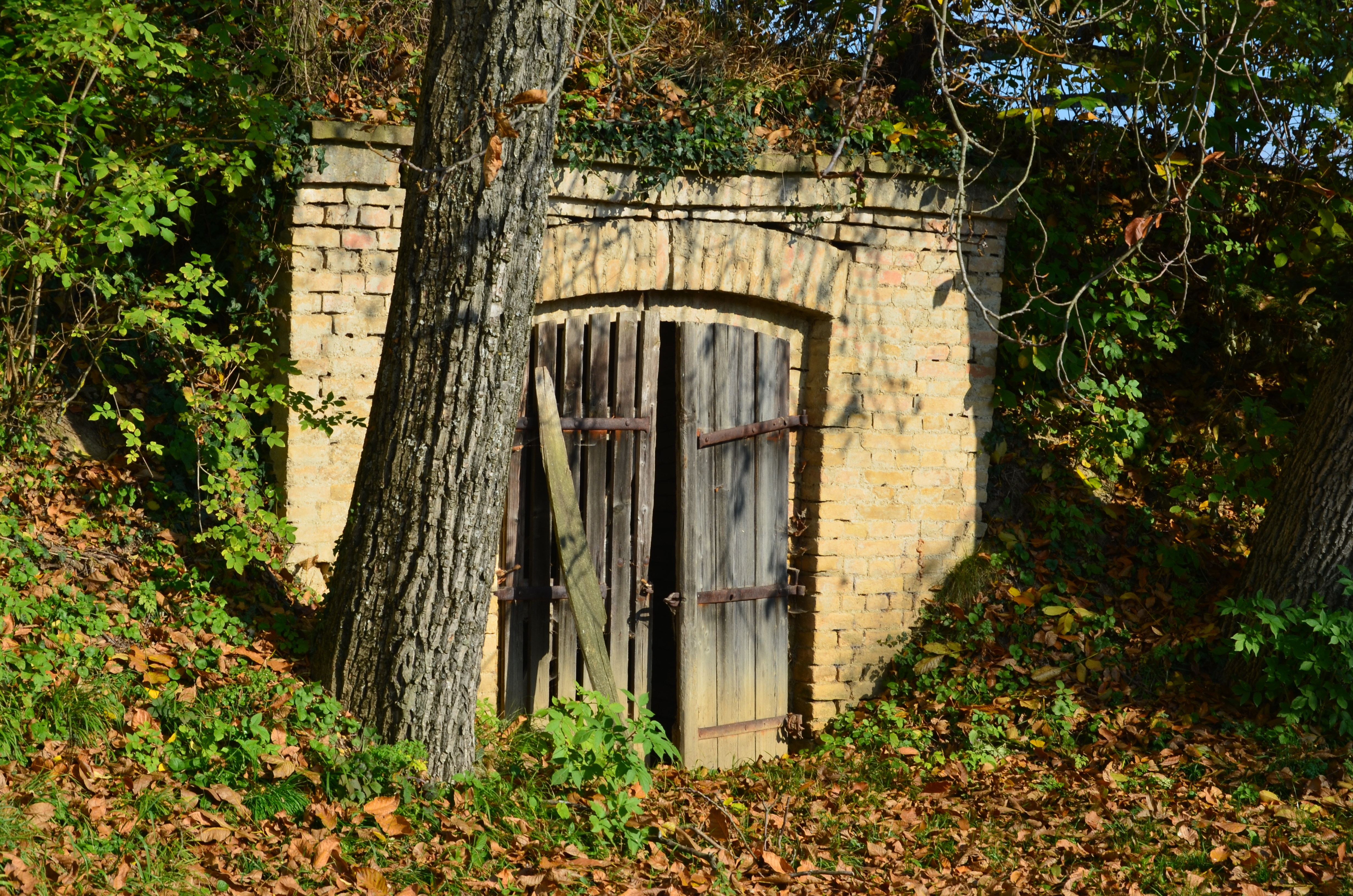 „Hintaus“